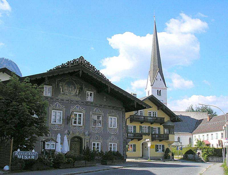 Alte Pfarrkirche St. Martin (Garmisch, Obb.). Ansicht mit dem "Husarenhaus" (Vordergrund).